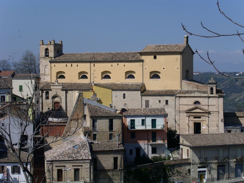 Scorcio del quartiere Sacca: in primo piano il profilo della chiesa di San Nicola e, sulla destra, la piccola chiesa di Santa Maria degli Angeli che le sta a ridosso. Foto scattata da me. Lanciano (CH), 7 aprile 2007.